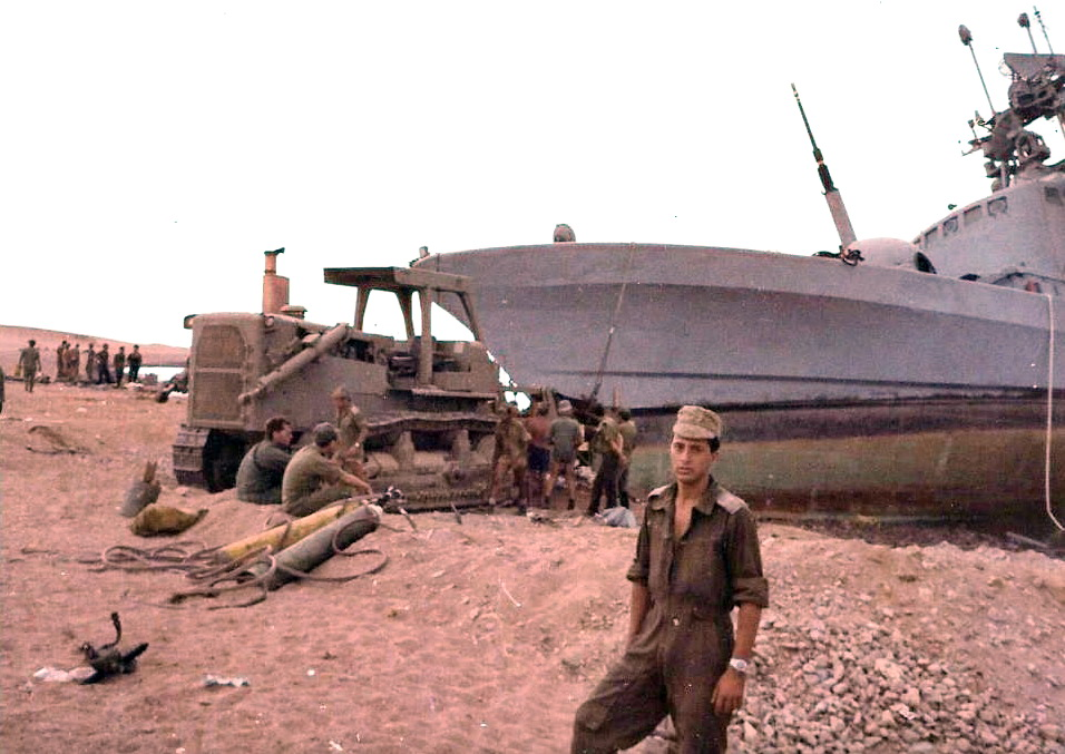 טרקטור קטרפילר שהובא בנחתת מתחבר לחרטום אח"י געש לצורך דחיפה למים